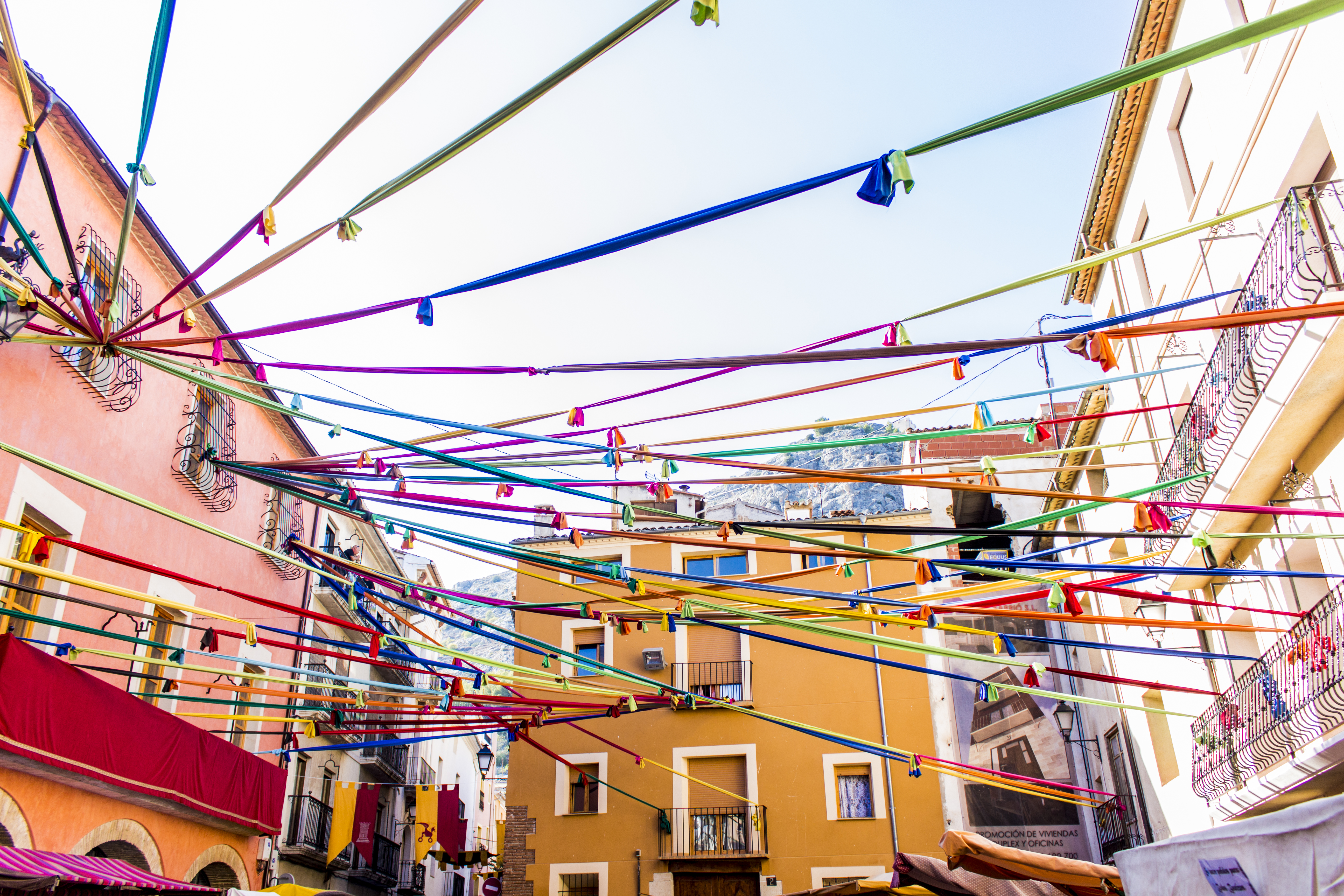 Cocentaina, Alicante.